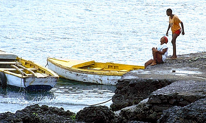 Pedra Badejo - S. Cruz. Julho de 1997.